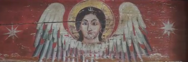 Детайл от иконстаса на църквата "Свети Георги" в Янешево, Кукушко